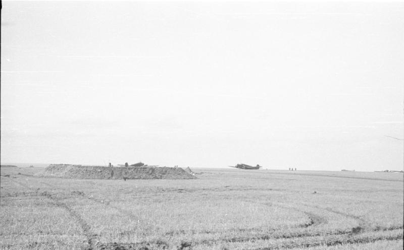 Krim, Anfang Mai 1942 Aufmarsch zum Angriff auf die Halbinsel Kertsch